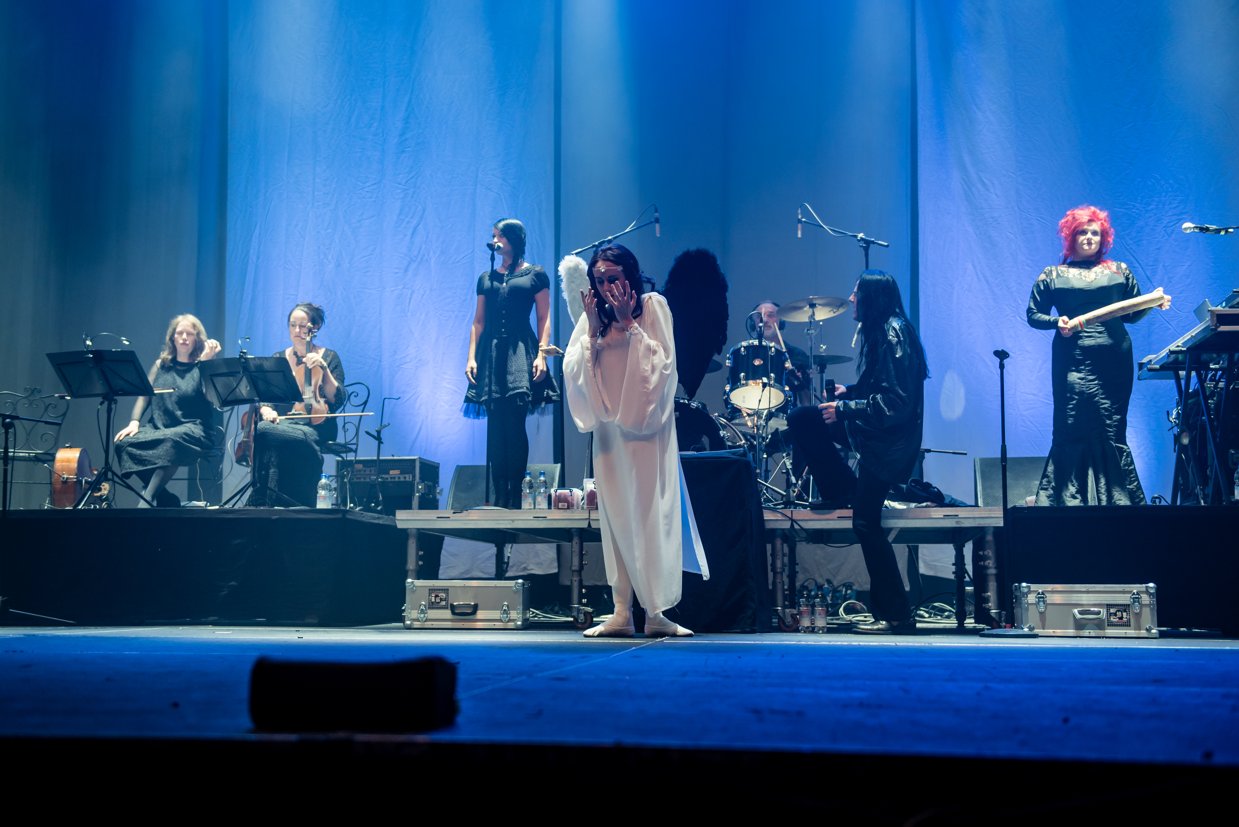 'Amphi Festival 2015; Köln - Lanxess Arena': 'Goethes Erben'